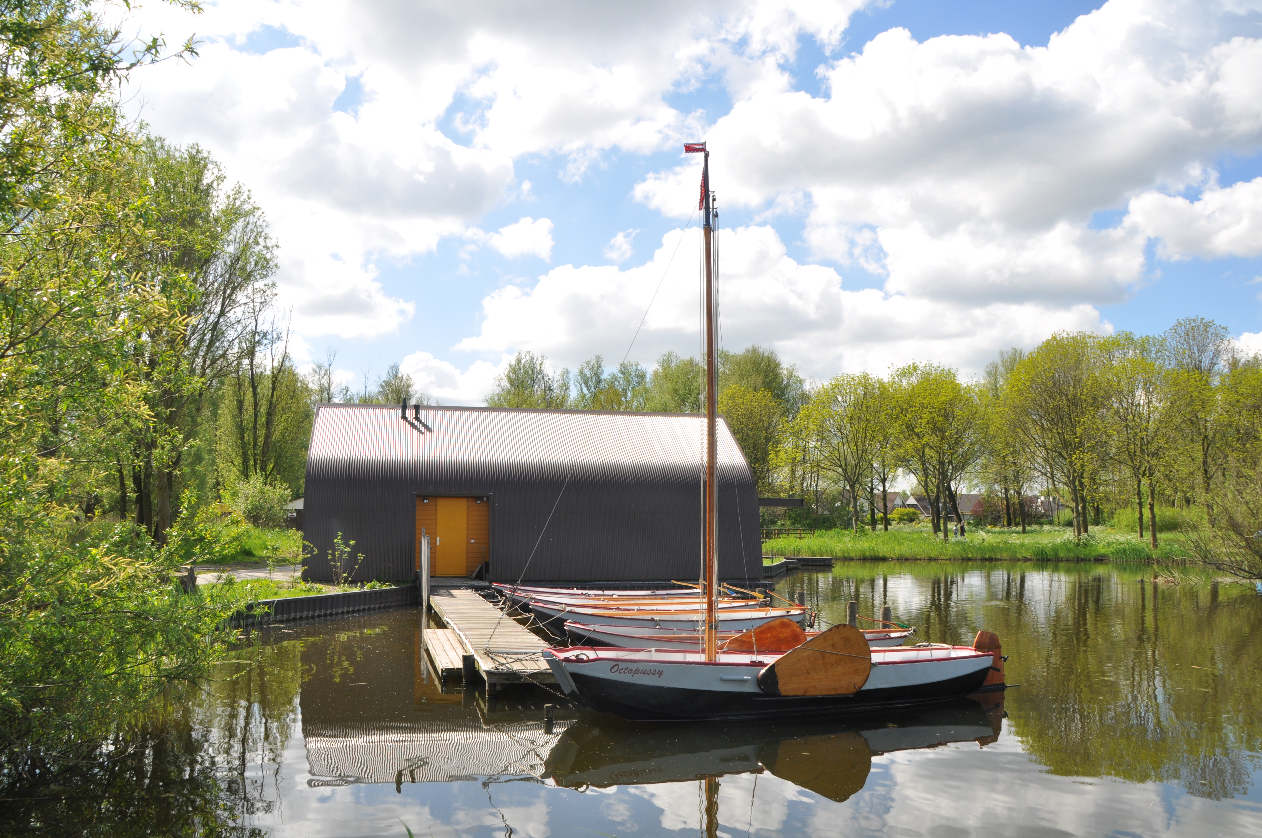 Botenhuizen langs de Zoetermeerse Plas